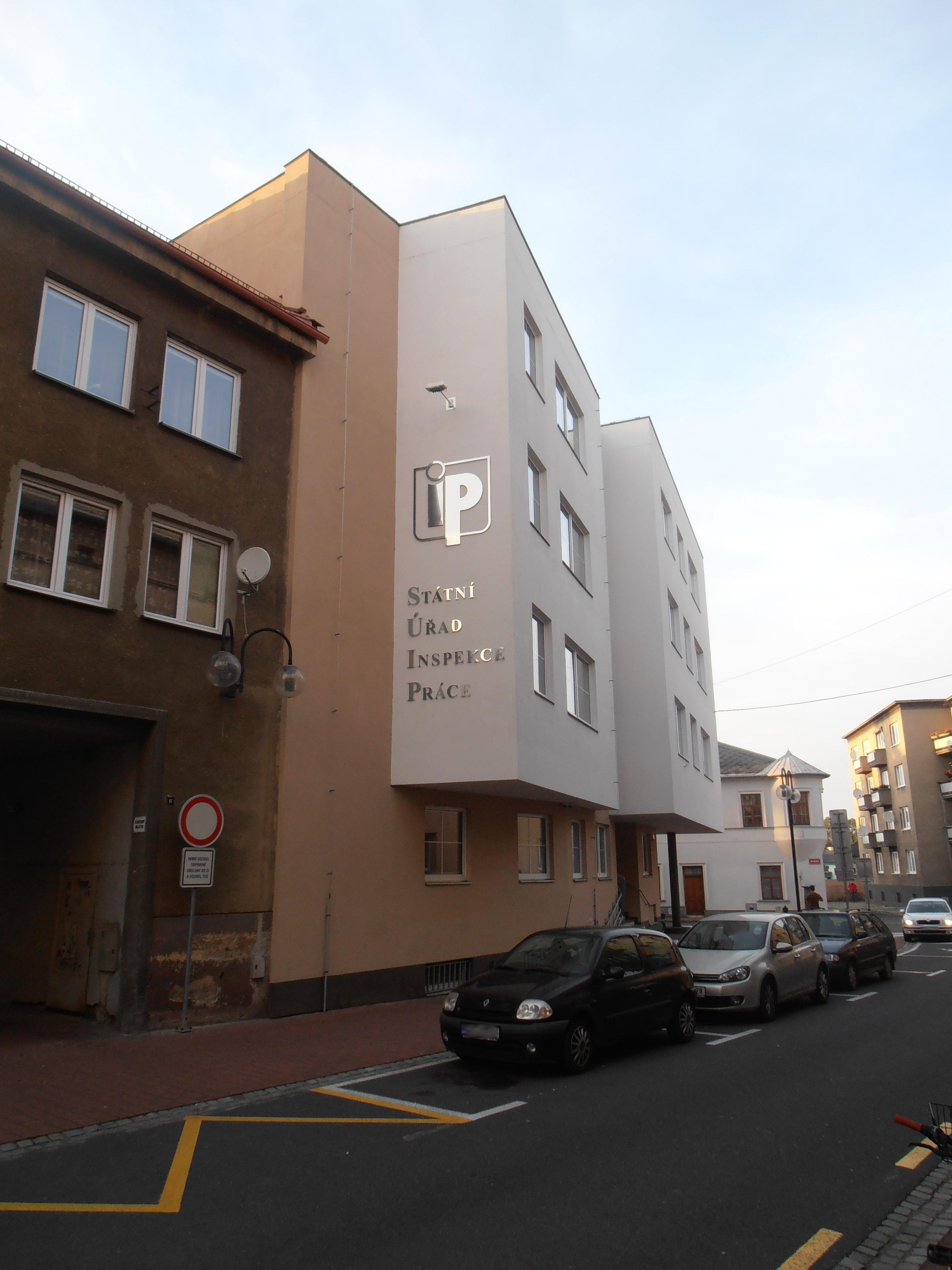 sídlo Státního úřadu inspekce práce, Kolářská 451/13, Opava-Město.